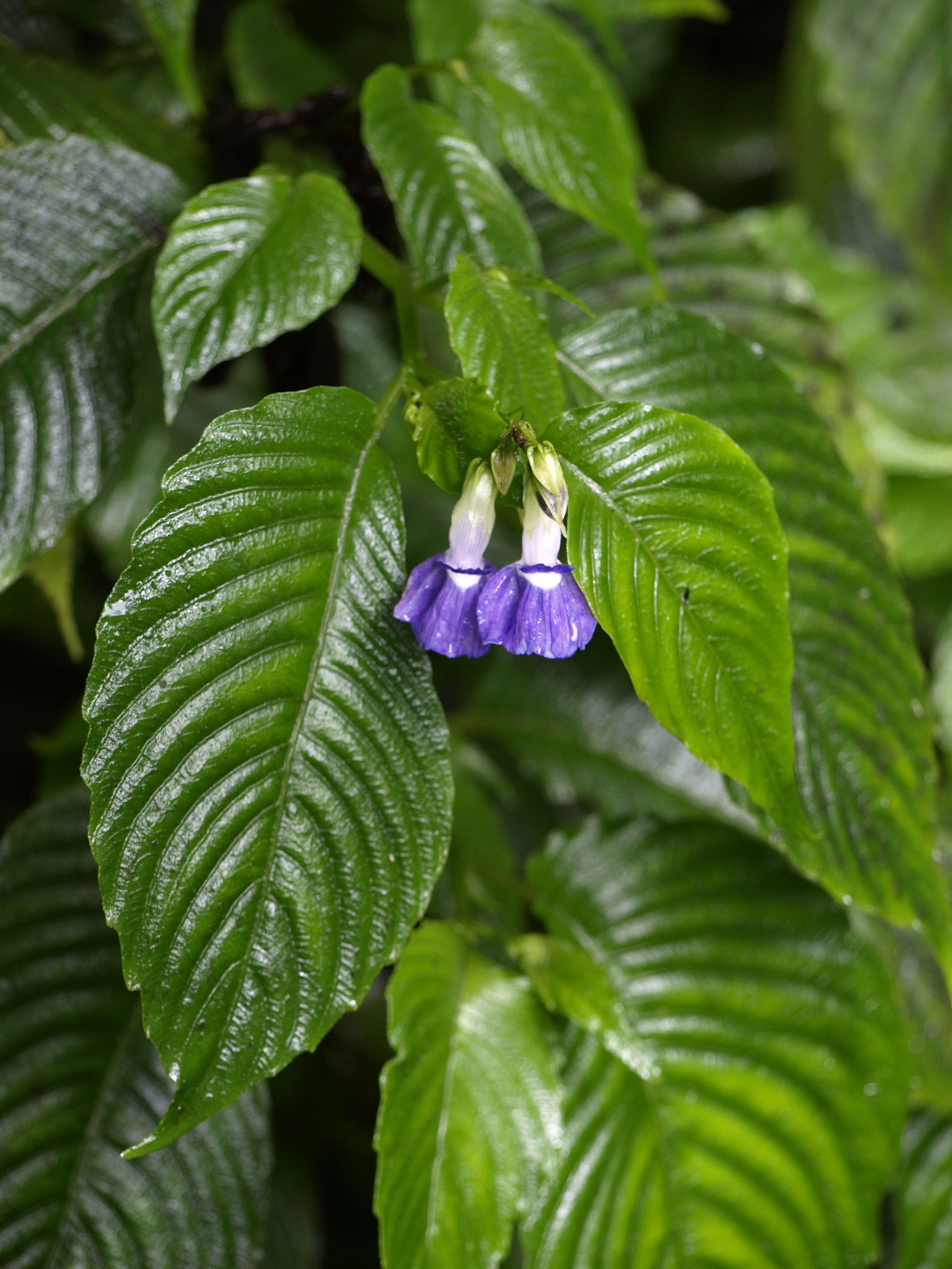 Rhynchoglossum azureum La Paz Waterfall Gardens, Costa Rica